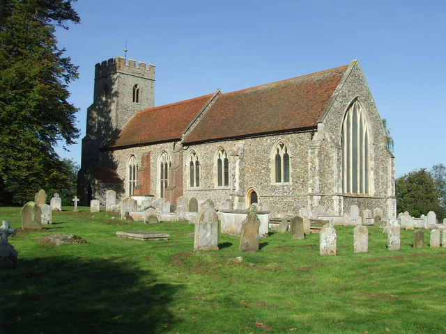 St.Andrew Bulmer